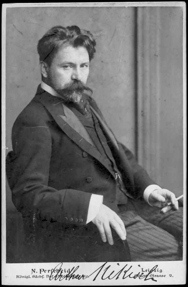 Portrait ("Kniestück") des Dirigenten Arthur Nikisch, Kabinettformat.